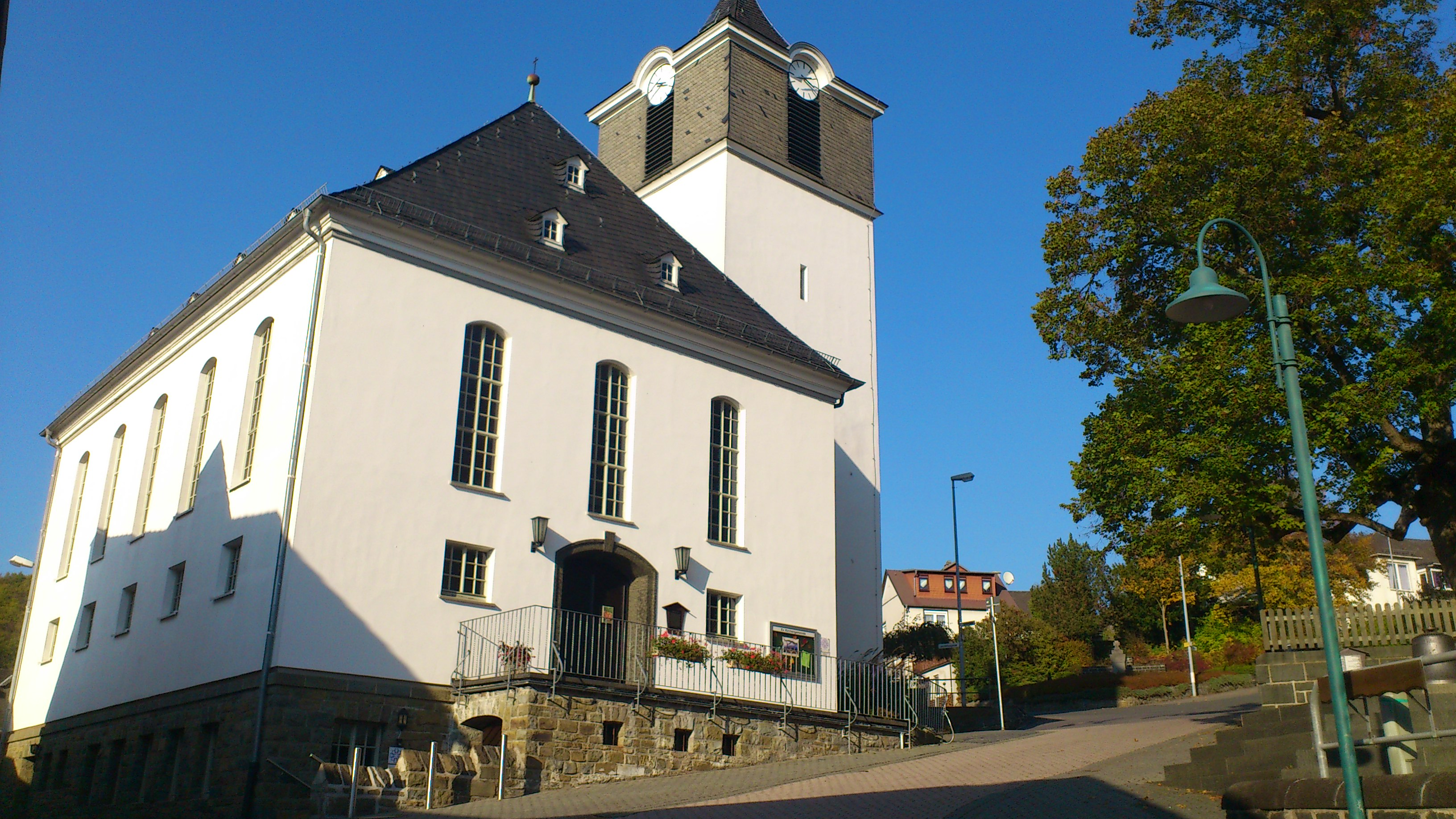 Evangelische Kirche in Herborn-Seelbach (Germany)